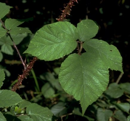 Rubus rosaceus